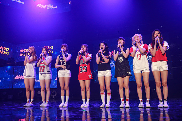 09월 26일 뮤콘 쇼케이스 MUCON Showcase 위키미키(Weki Meki)